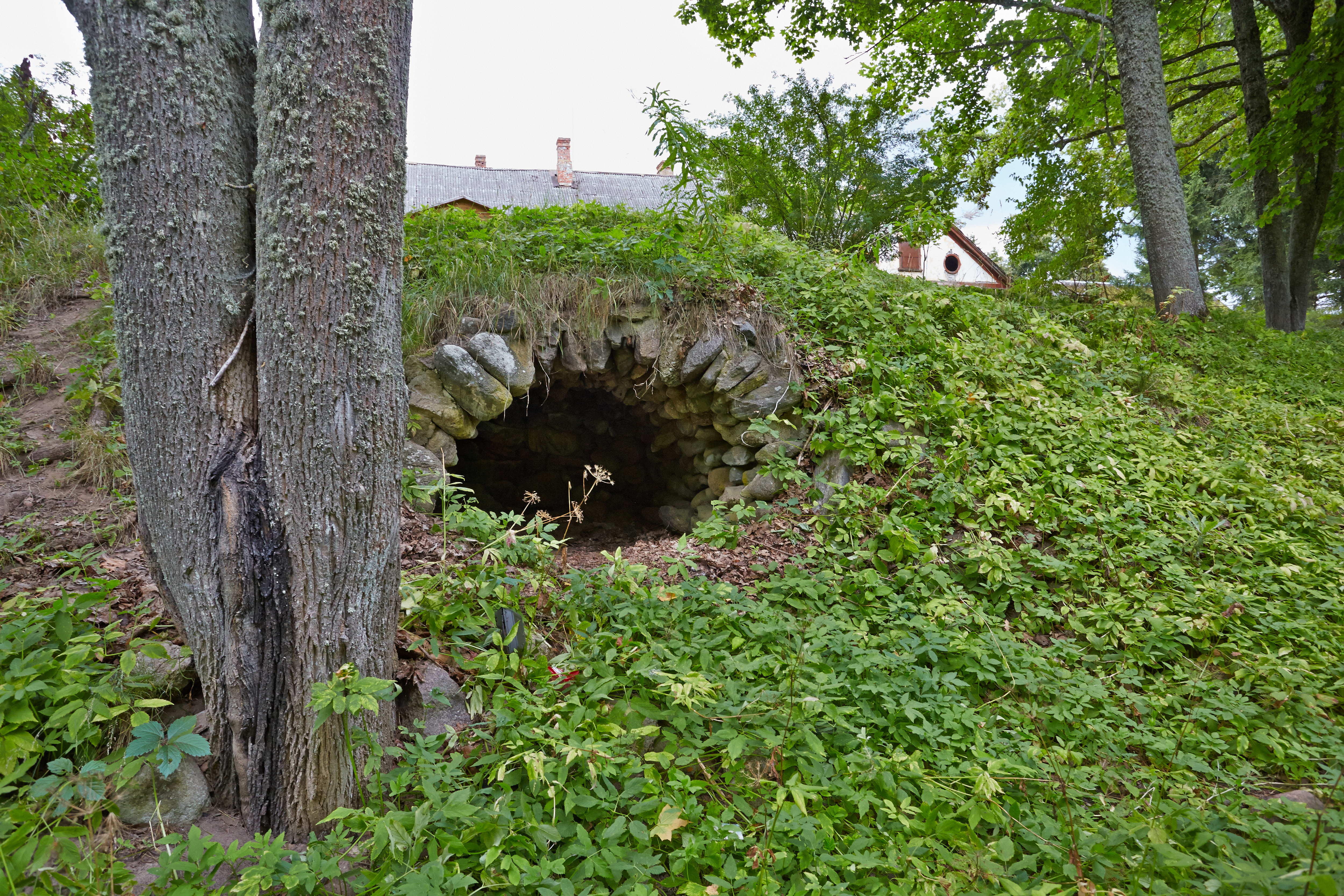 Tilsi mõisa pargigrott